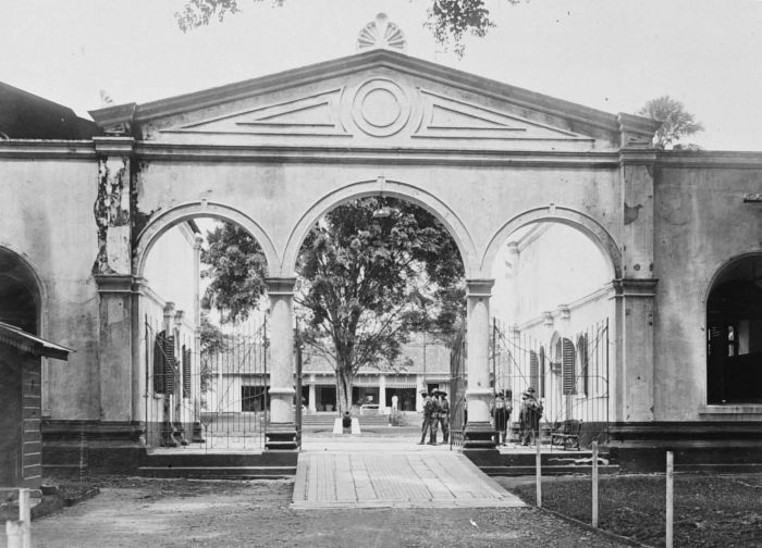 Repronegatief. Hoofdpoort van het fort te Palembang